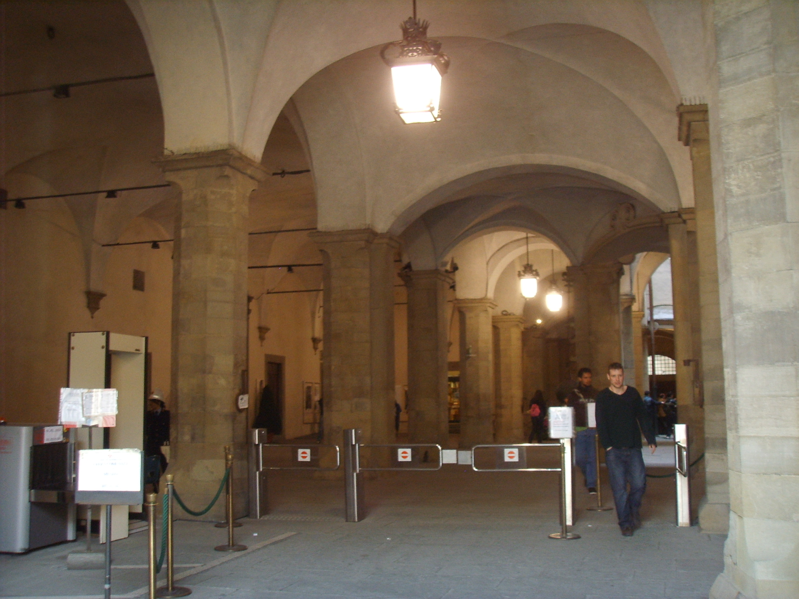 Palazzo vecchio, cortile della dogana